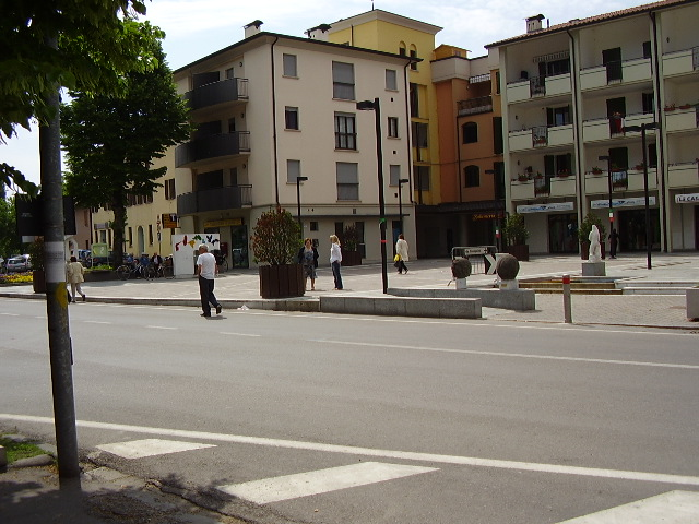 Fonte